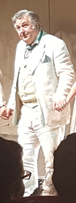 Ιεροκλής Μιχαηλίδης, Θέατρο Άνεσις, Παράσταση Έγκλημα και Τιμωρία, Ντοστογιέφσκι, Οκτ. 2016